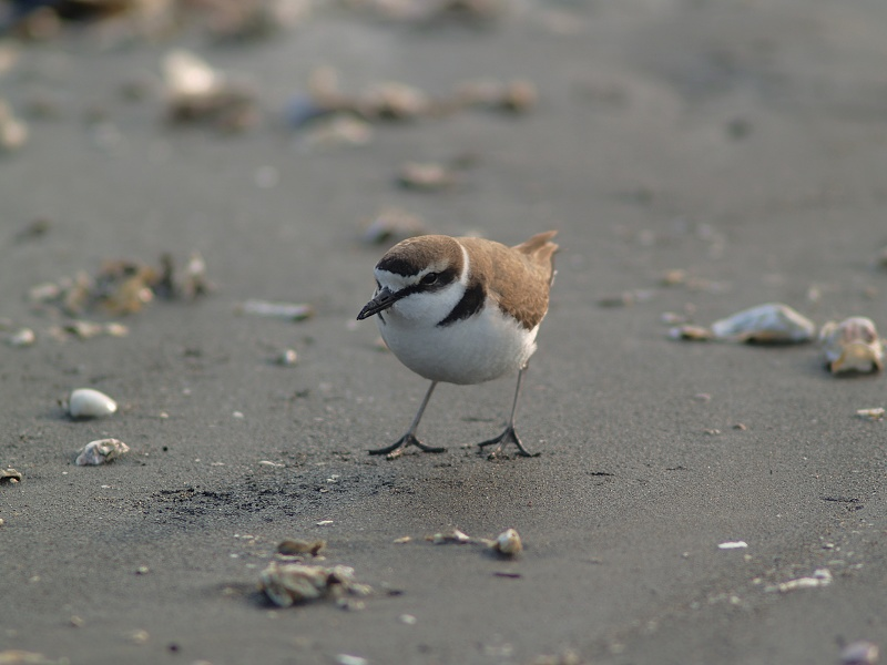 Charadrius alexandrinus 東方環頸鴴